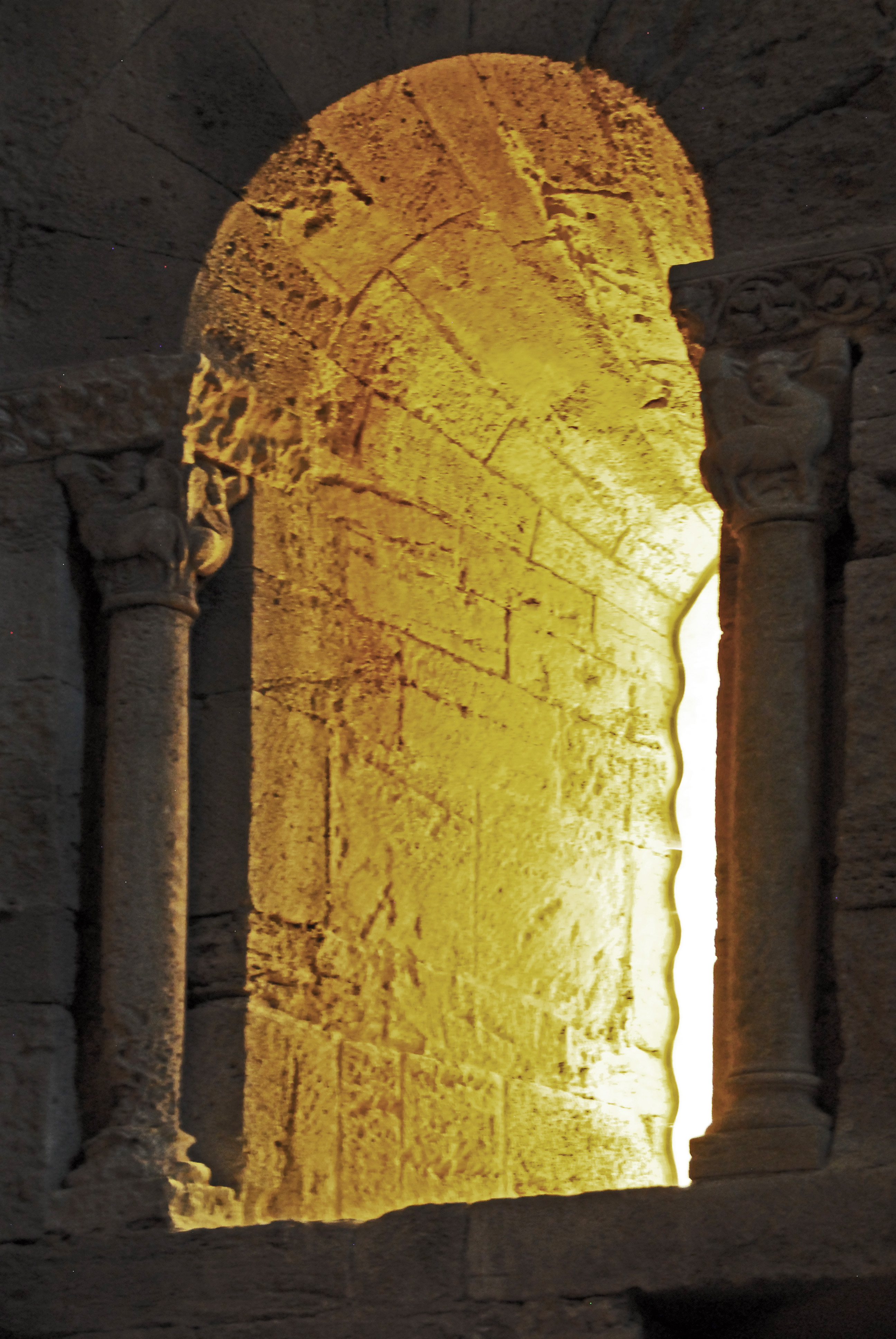 St-Pierre-et-St-Paul de Maguelone, Südfenster über Empore